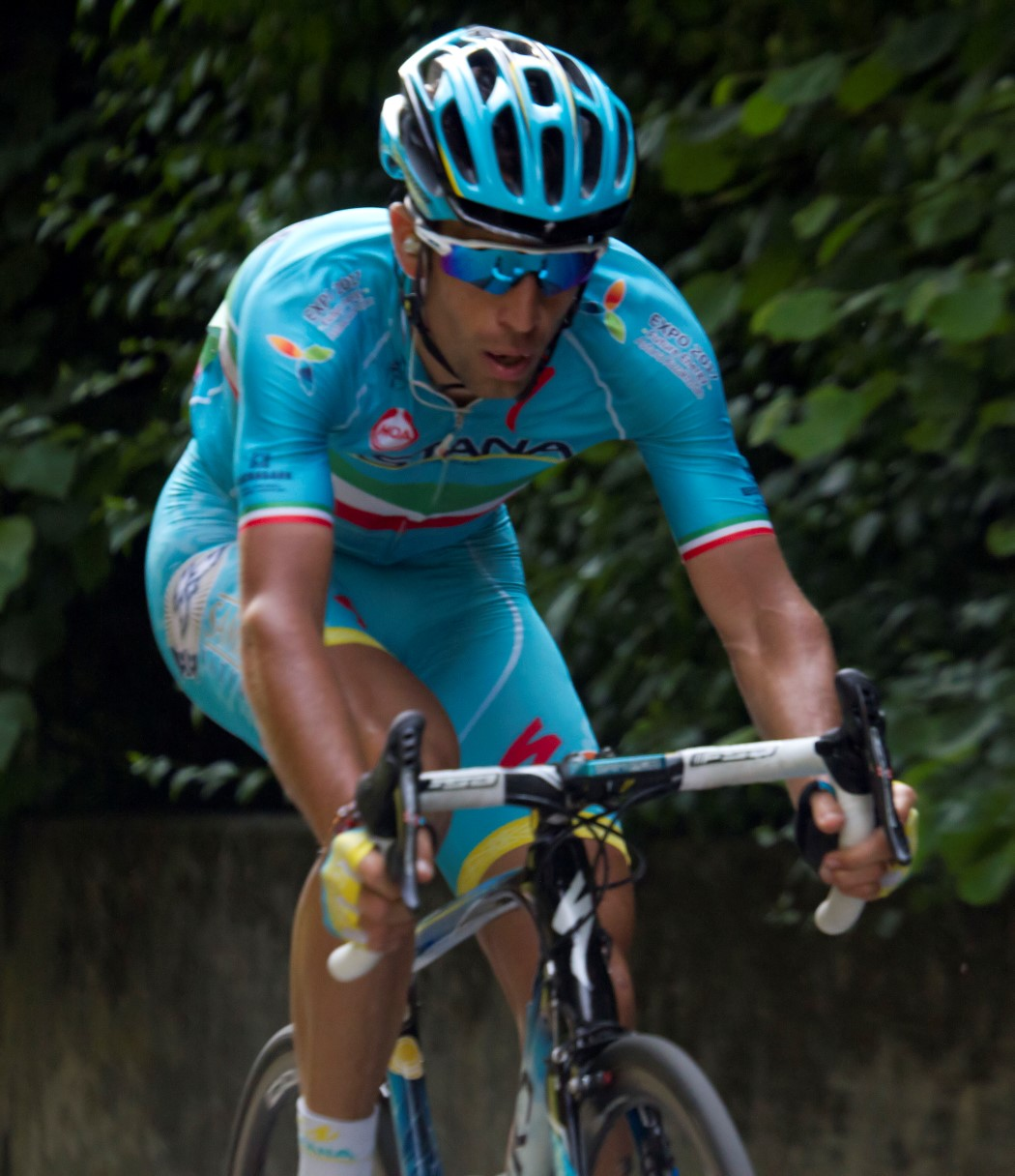 156 nibali